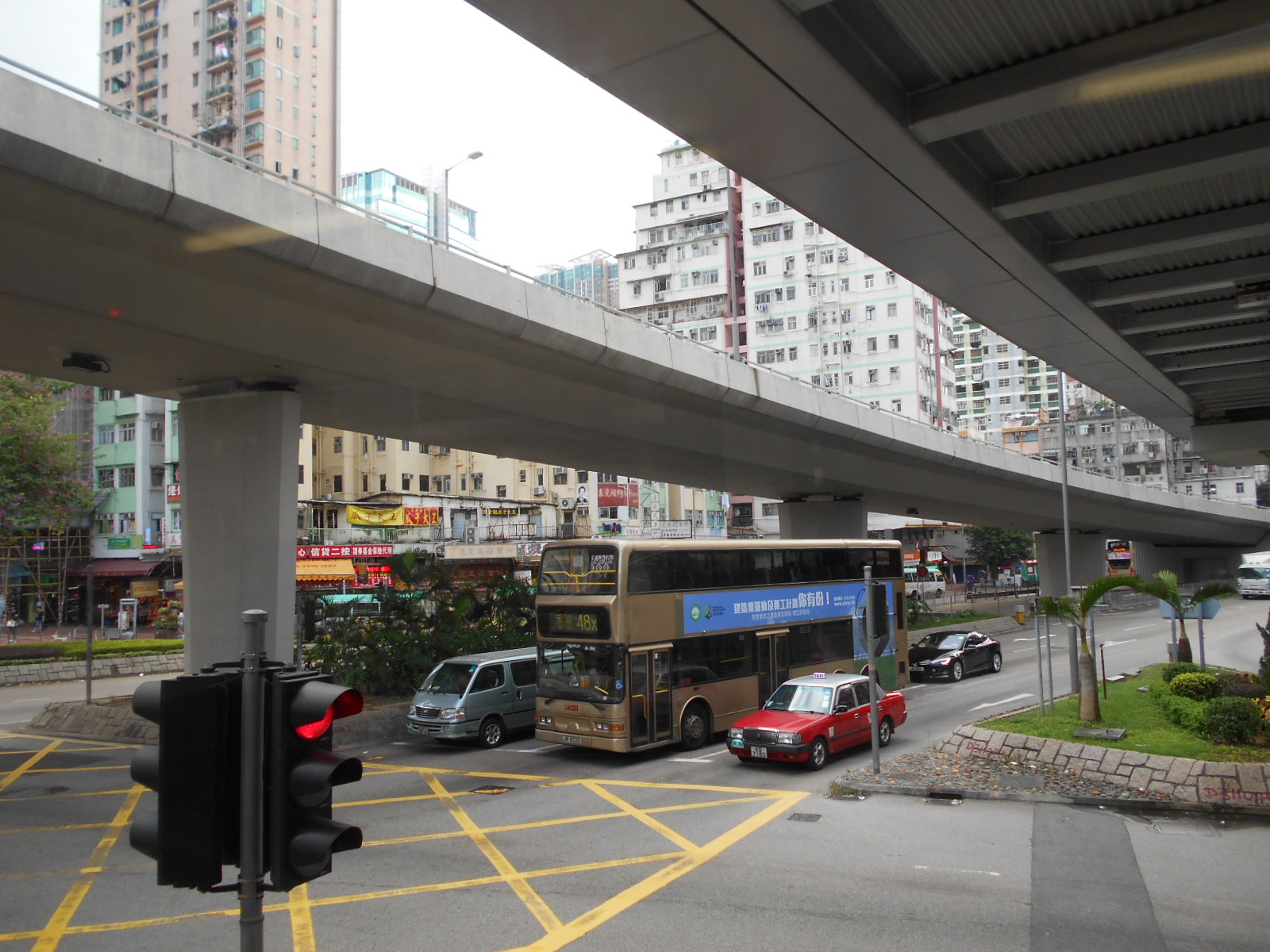 中文（香港）: 大河道與青山公路交界(2016年)